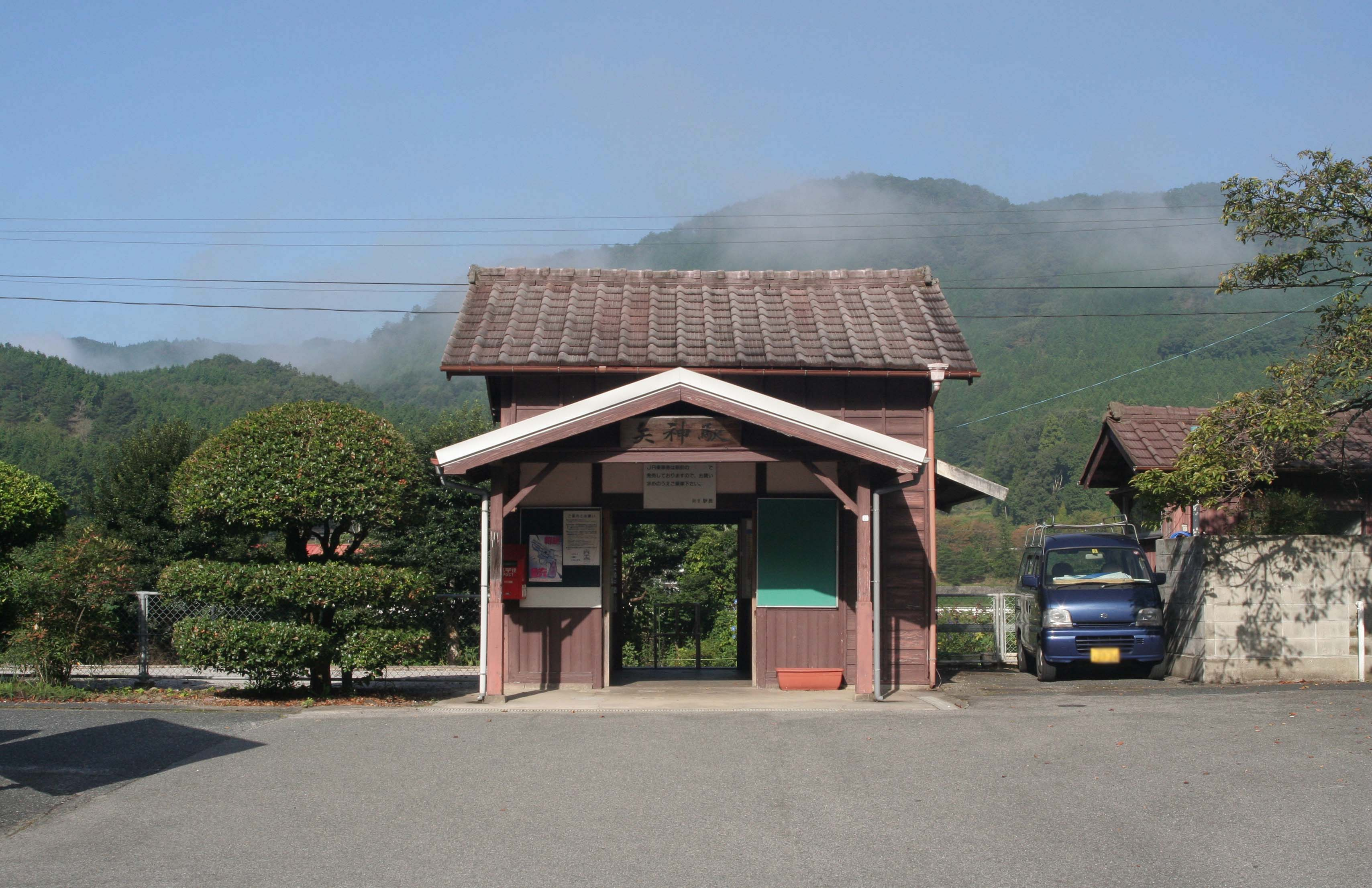 西日本旅客鉄道 矢神駅の駅舎